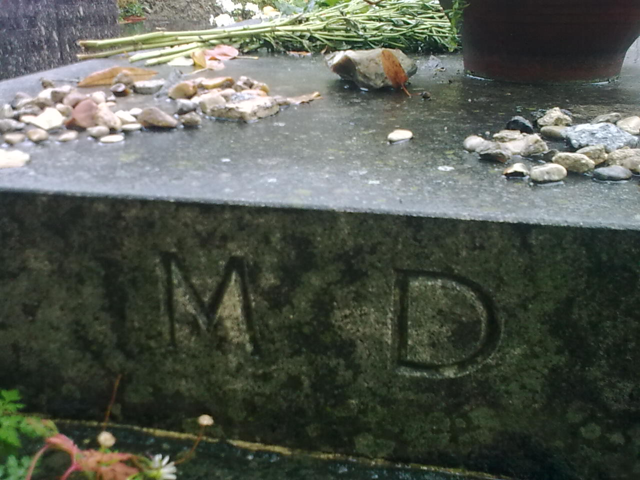 Pierre tombale de Marguerite Duras (Cimetière du Montparnasse, Paris).